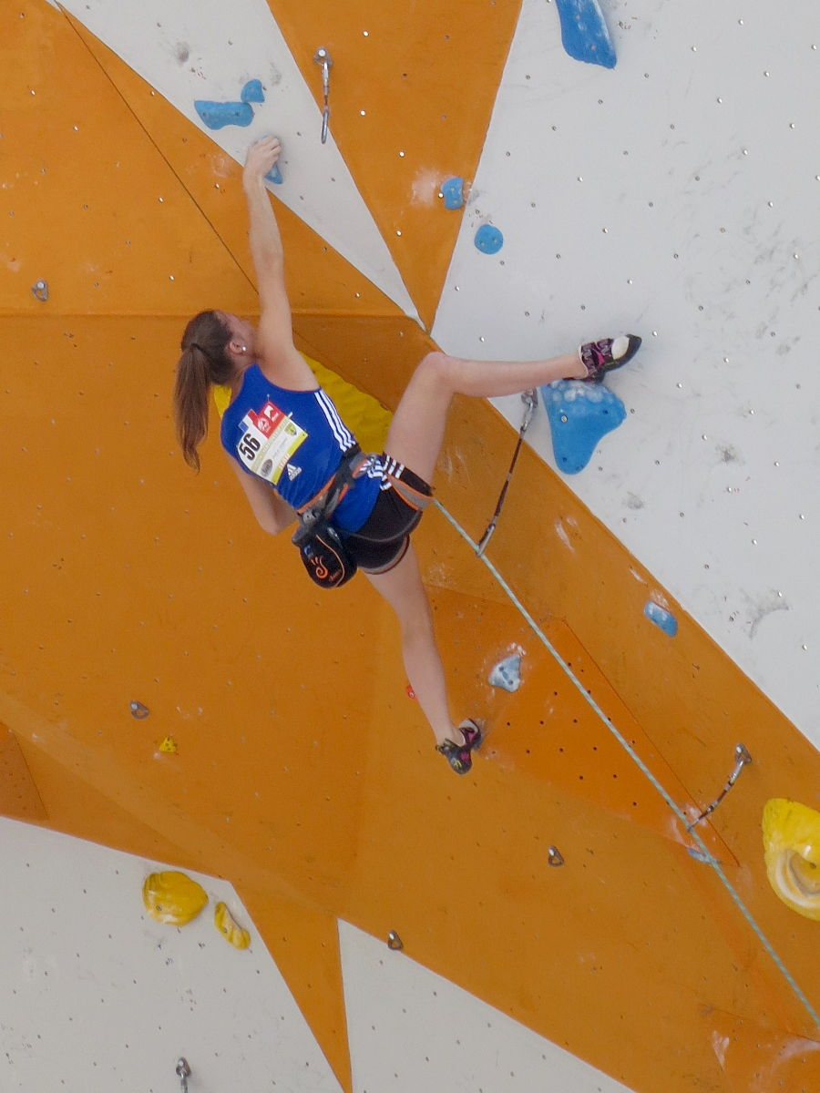 Julia Chanourdie en demi-finale du championnat d'Europe d'escalade (difficulté) 2013 à Chamonix